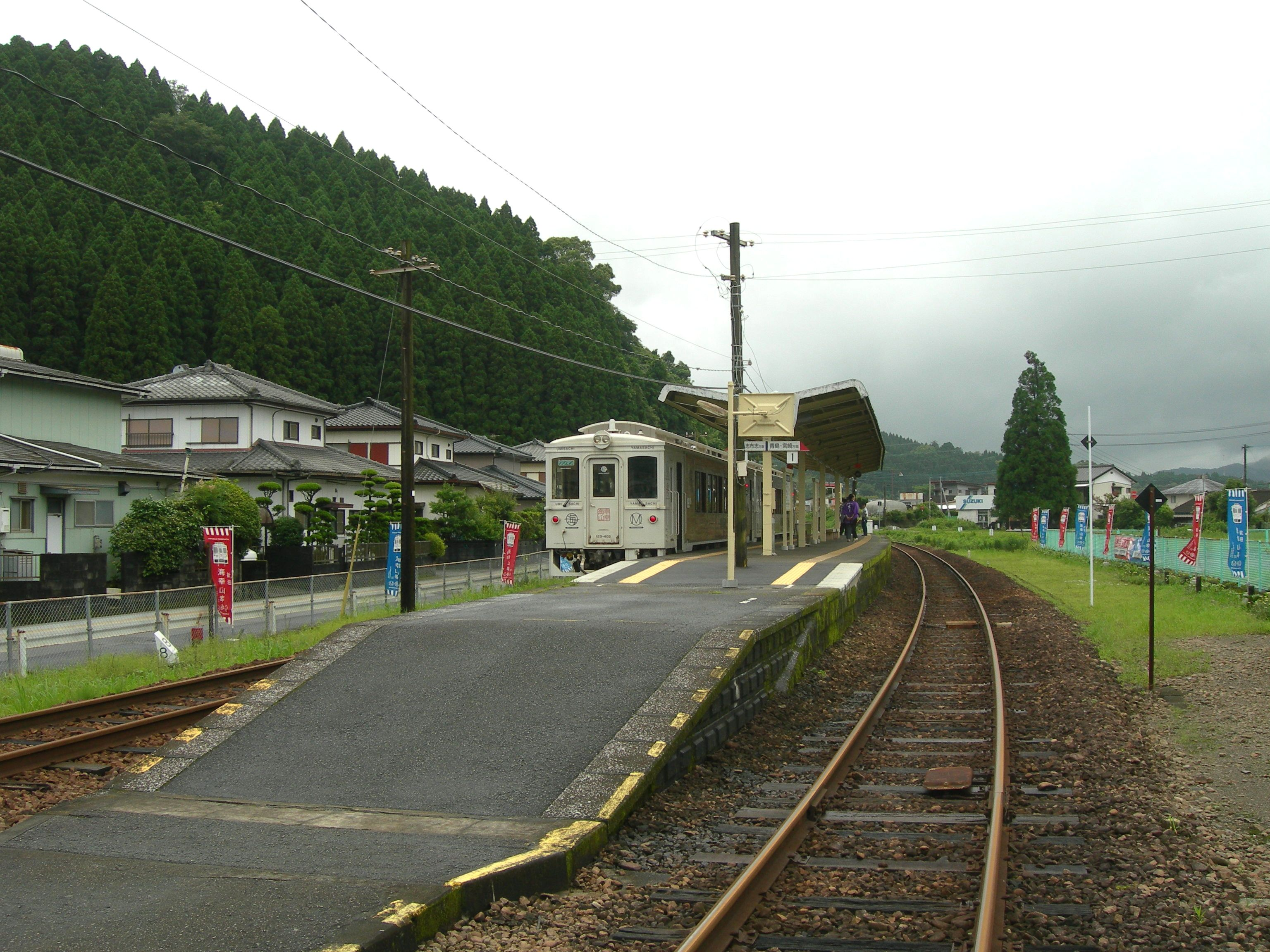 飫肥駅ホーム